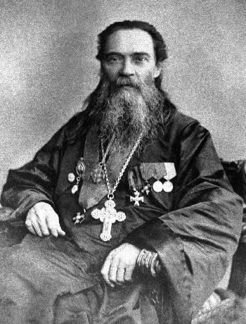 Андрей Григорьевич Полотебнов